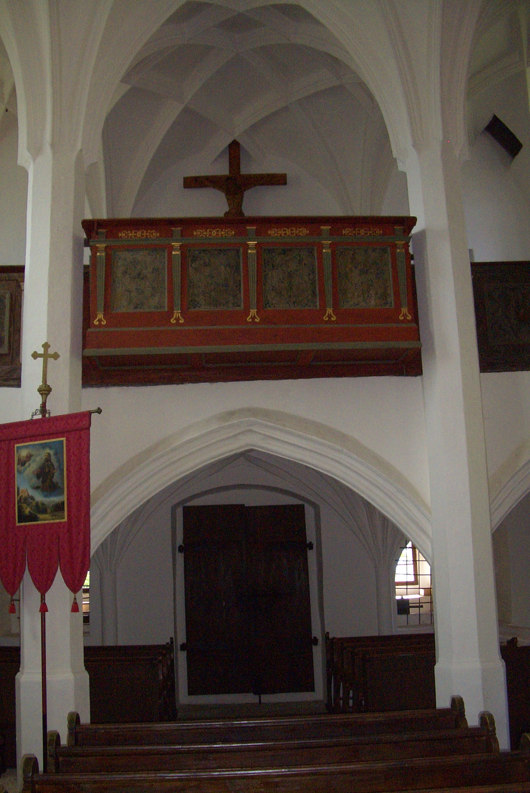 Kath. Filialkirche hl. Sebald Heiligenstein